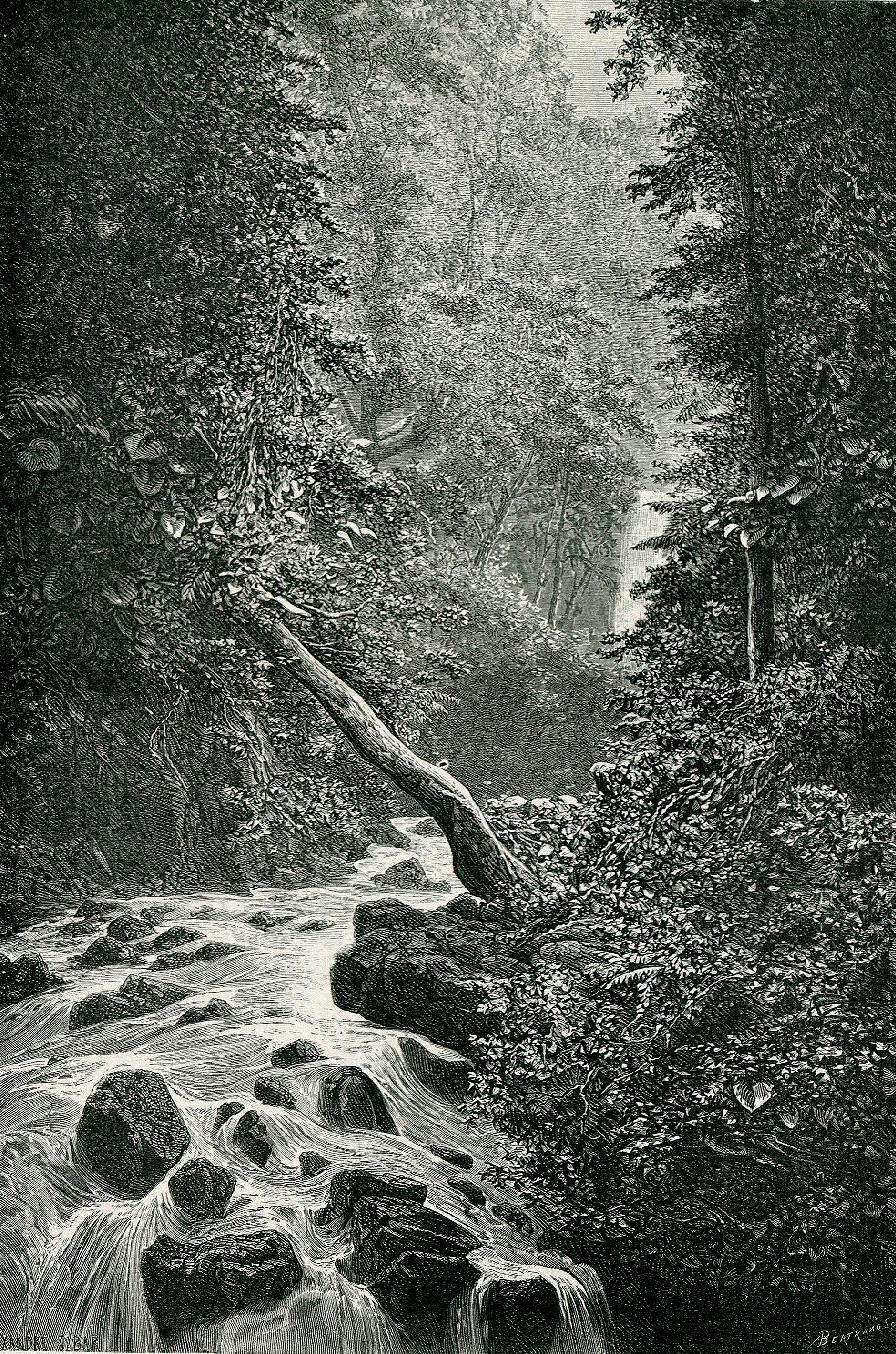 Urwald in Westsumatra